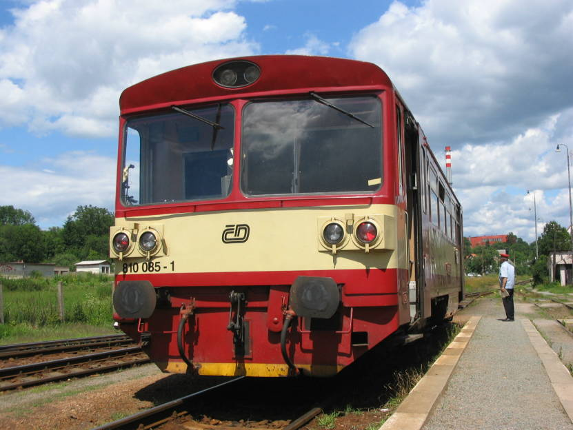 Motorový vůz řady 810, stanice Vamberk